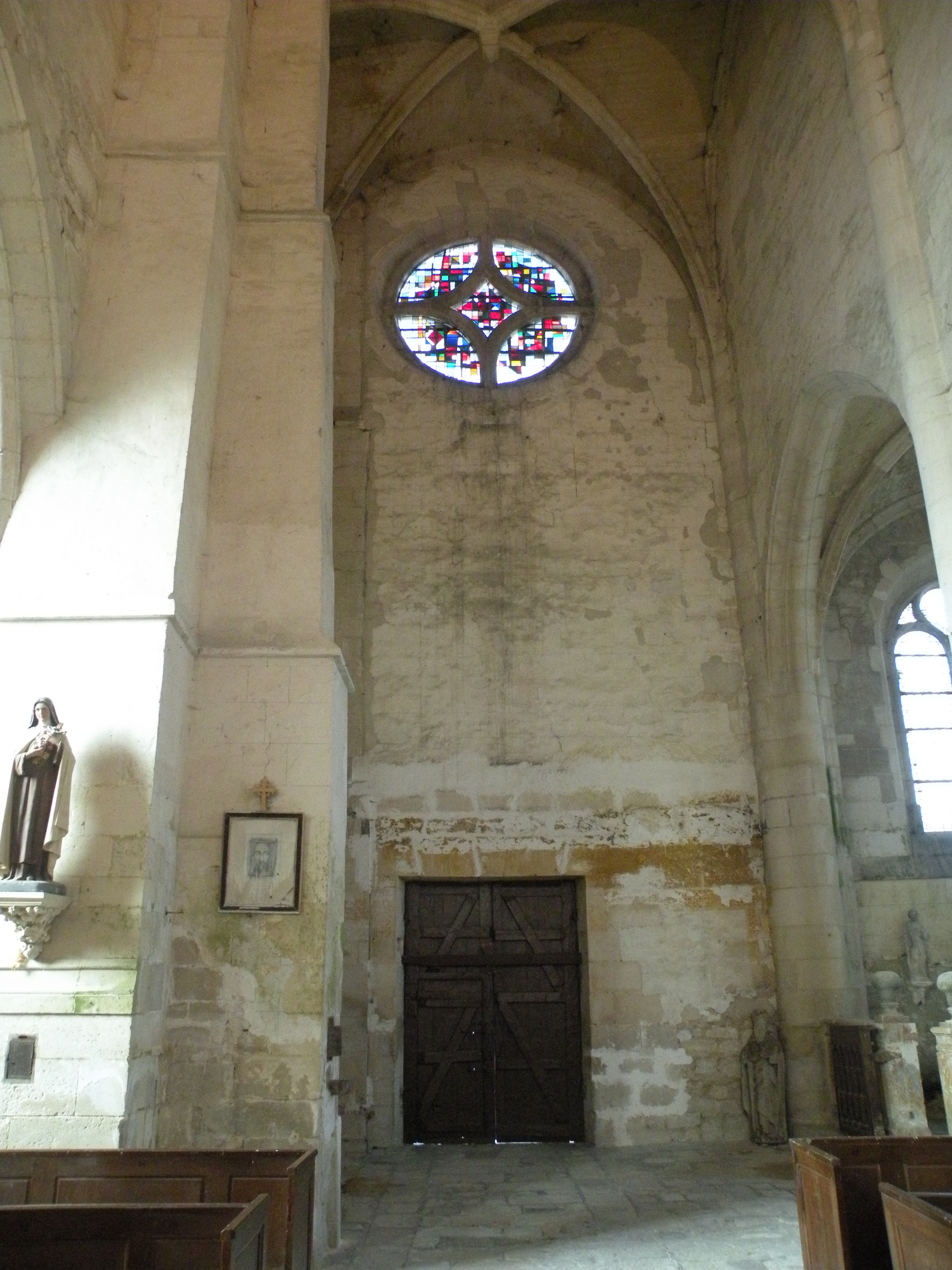 Église Saint-Pierre-et-Saint-Paul de Baron, nef, extrémité ouest.